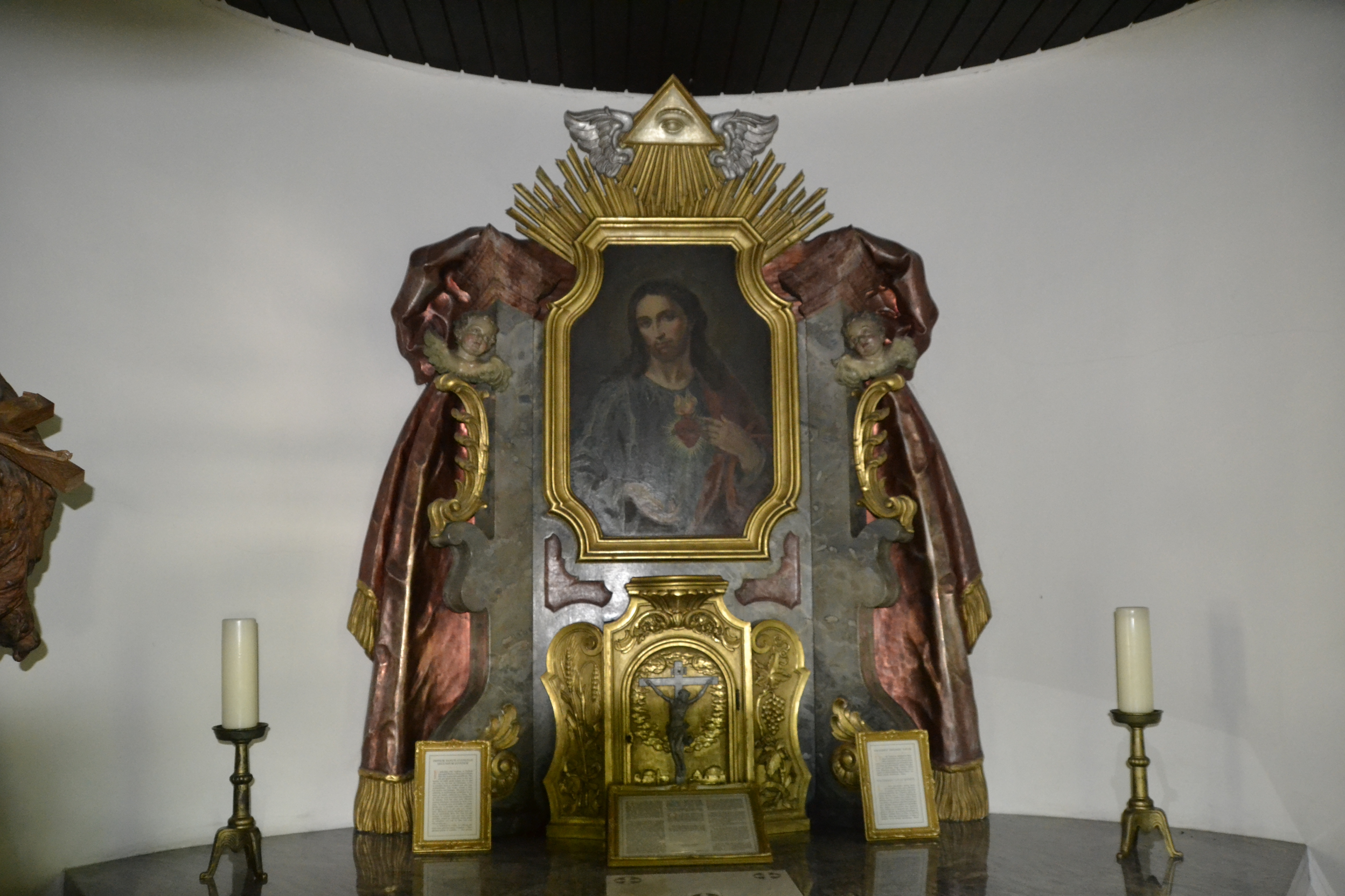 Die Johann-Nepomuk-Kapelle liegt im Münchner Stadtteil Pasing direkt an der Würm.